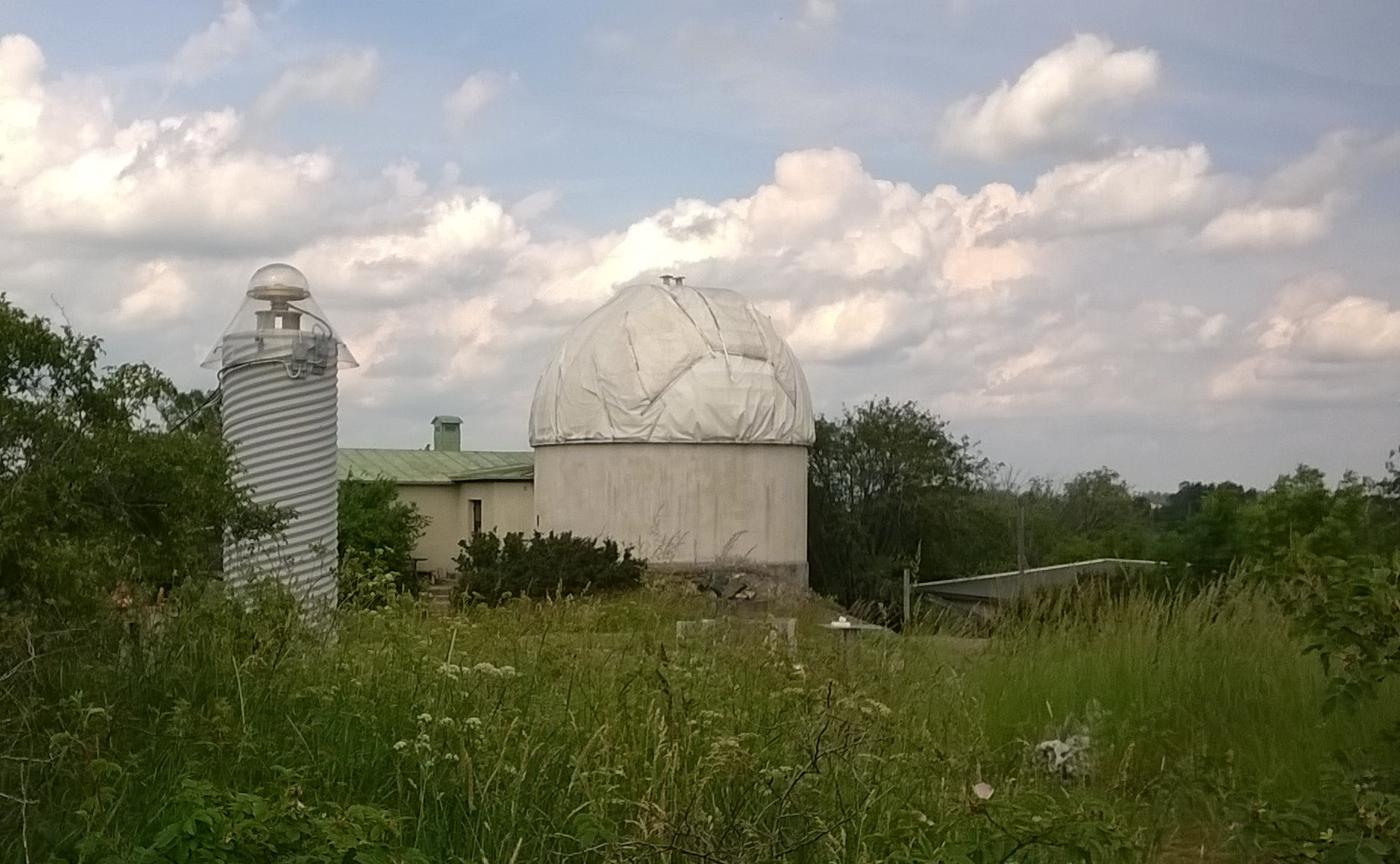 Hällbyobservatoriet med kupolbyggnaden